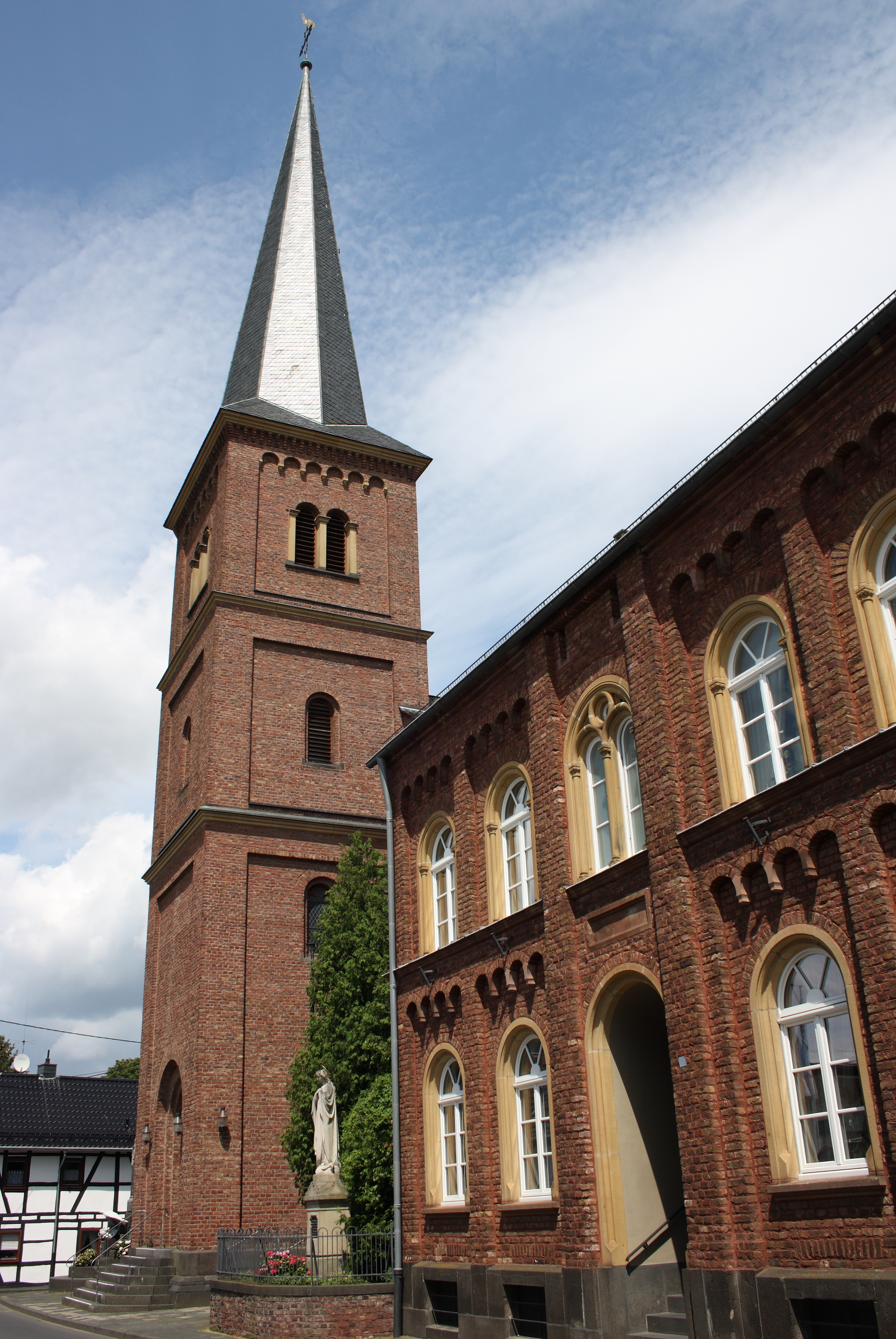 Kirchturm von St. Kunibert und Pfarrhaus in Heimerzheim, einem Ortsteil von Swisttal im Rhein-Sieg-Kreis